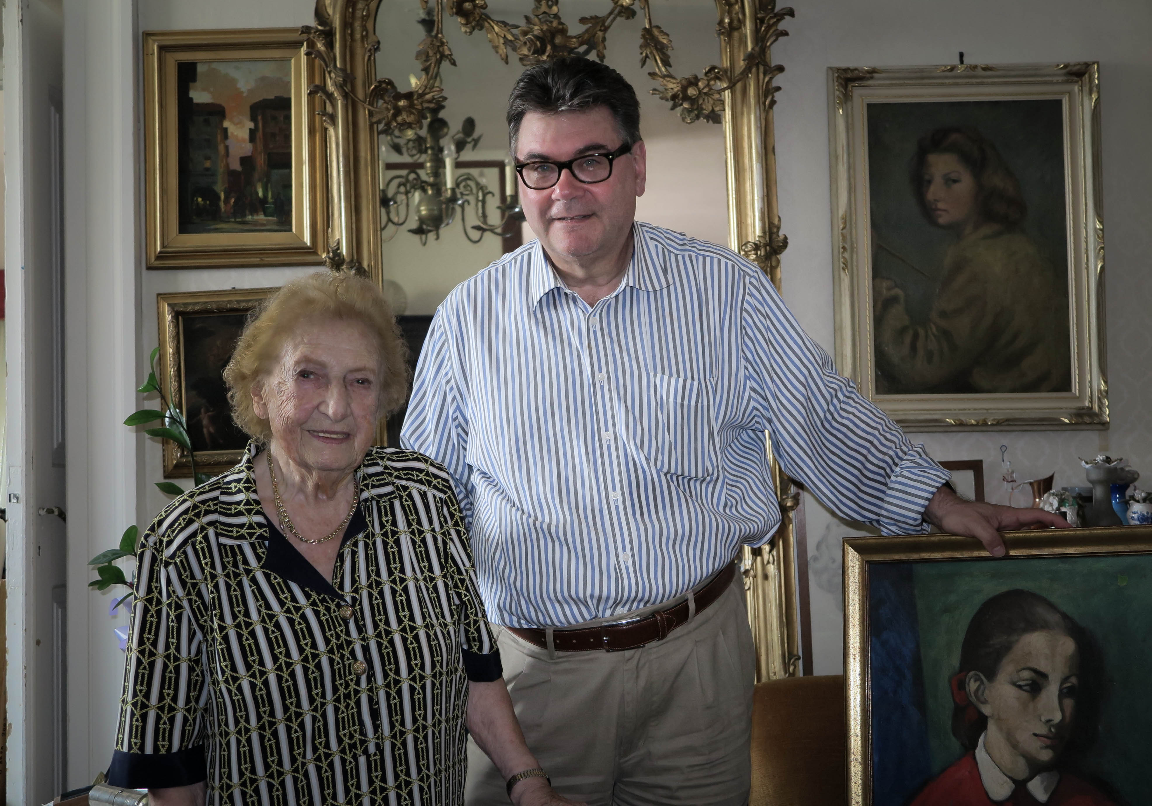 fotografia